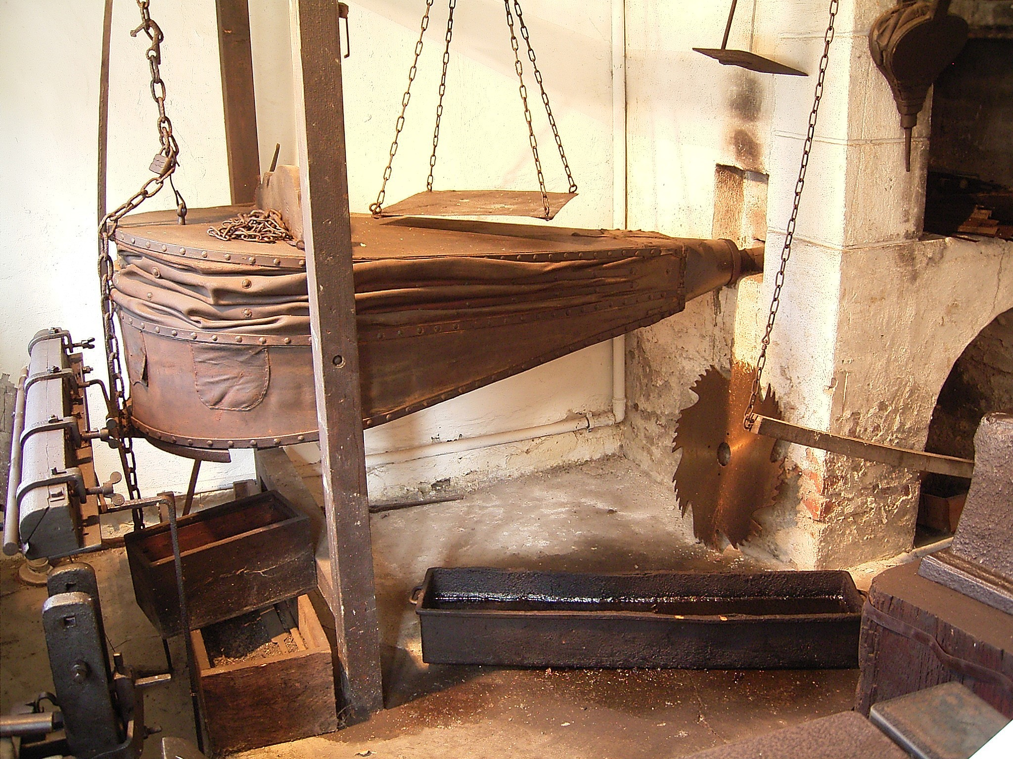 Deutsches Werkzeugmuseum in Remscheid / German tool museum in Remscheid, Germany